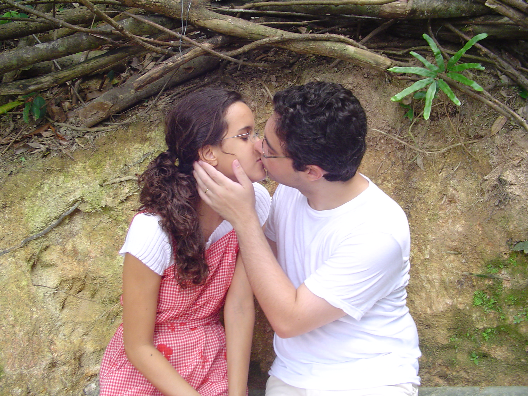 amor por anna carol